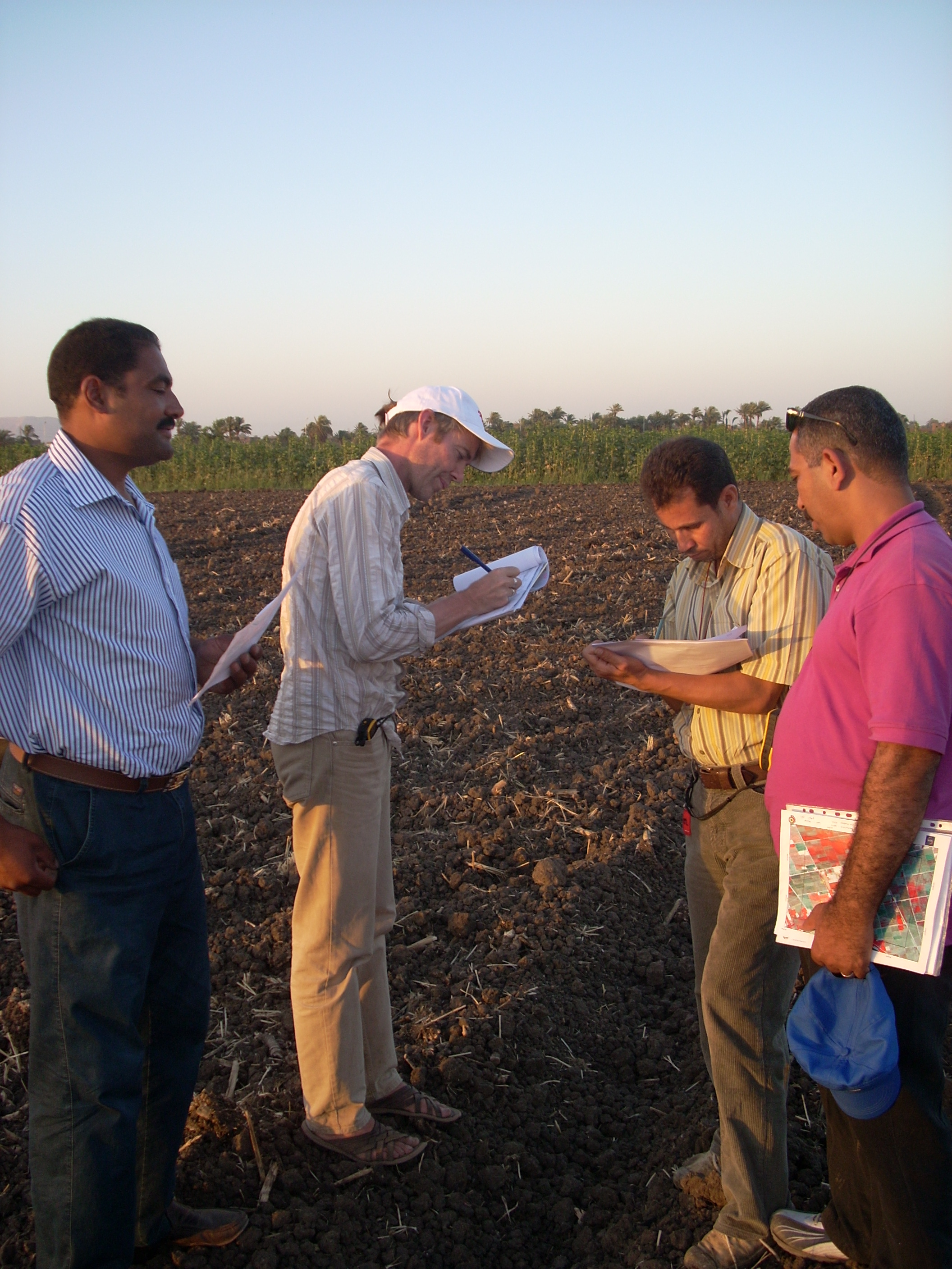 Inventaire des cultures d'hiver et d'été, évaluation des surfaces et rendements de certaines cultures (blé et cotton pour 2009) dans la vallée et le delta du Nil. Evaluation de l'emprise des petits canaux d'irrigation, évaluation de l'artificialisation et évaluation de la contamination des canaux et drains par la jacinthe d'eau. Enquête terrain dans la vallée du Nil